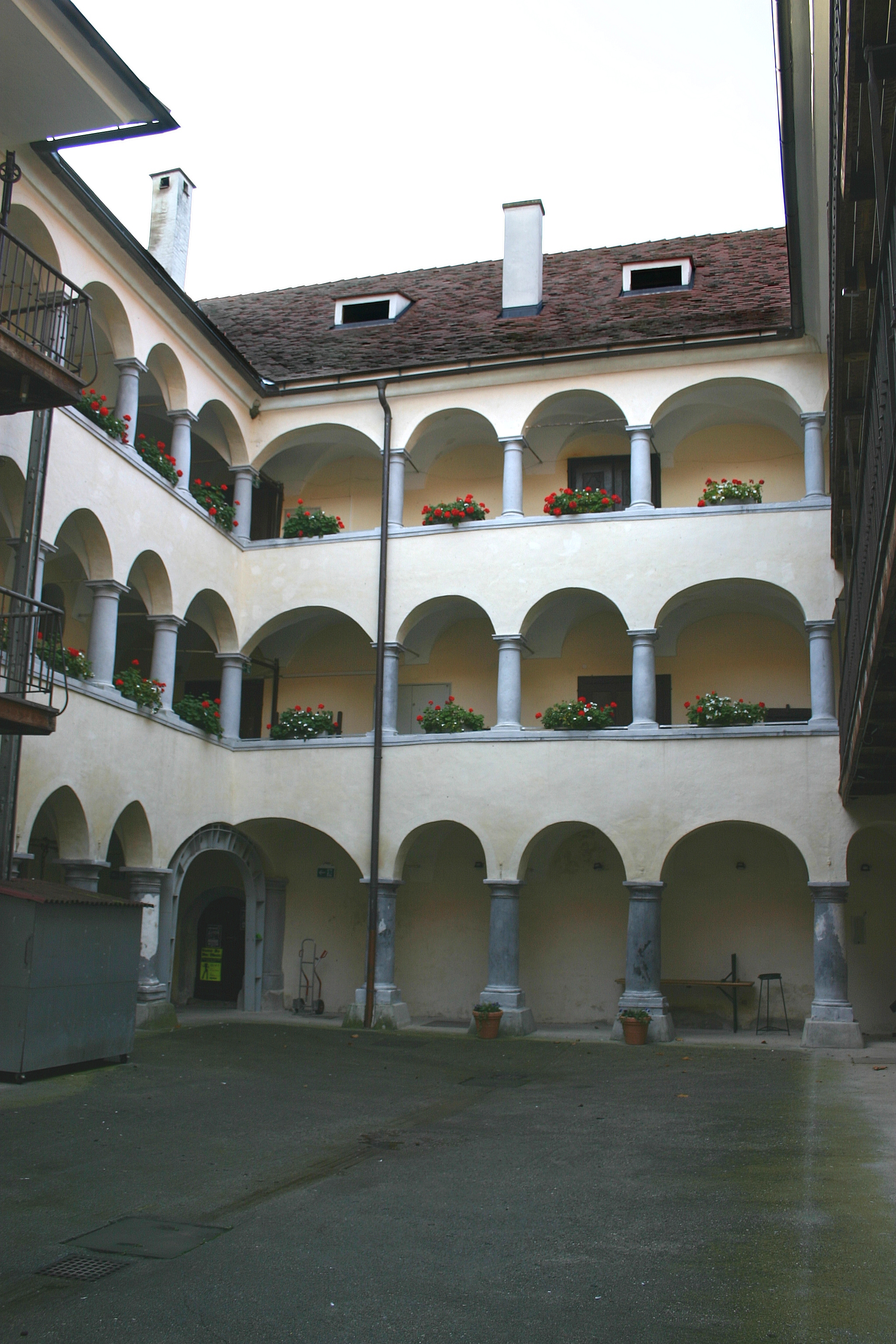 Burgau Schlosshof mit Arkaden